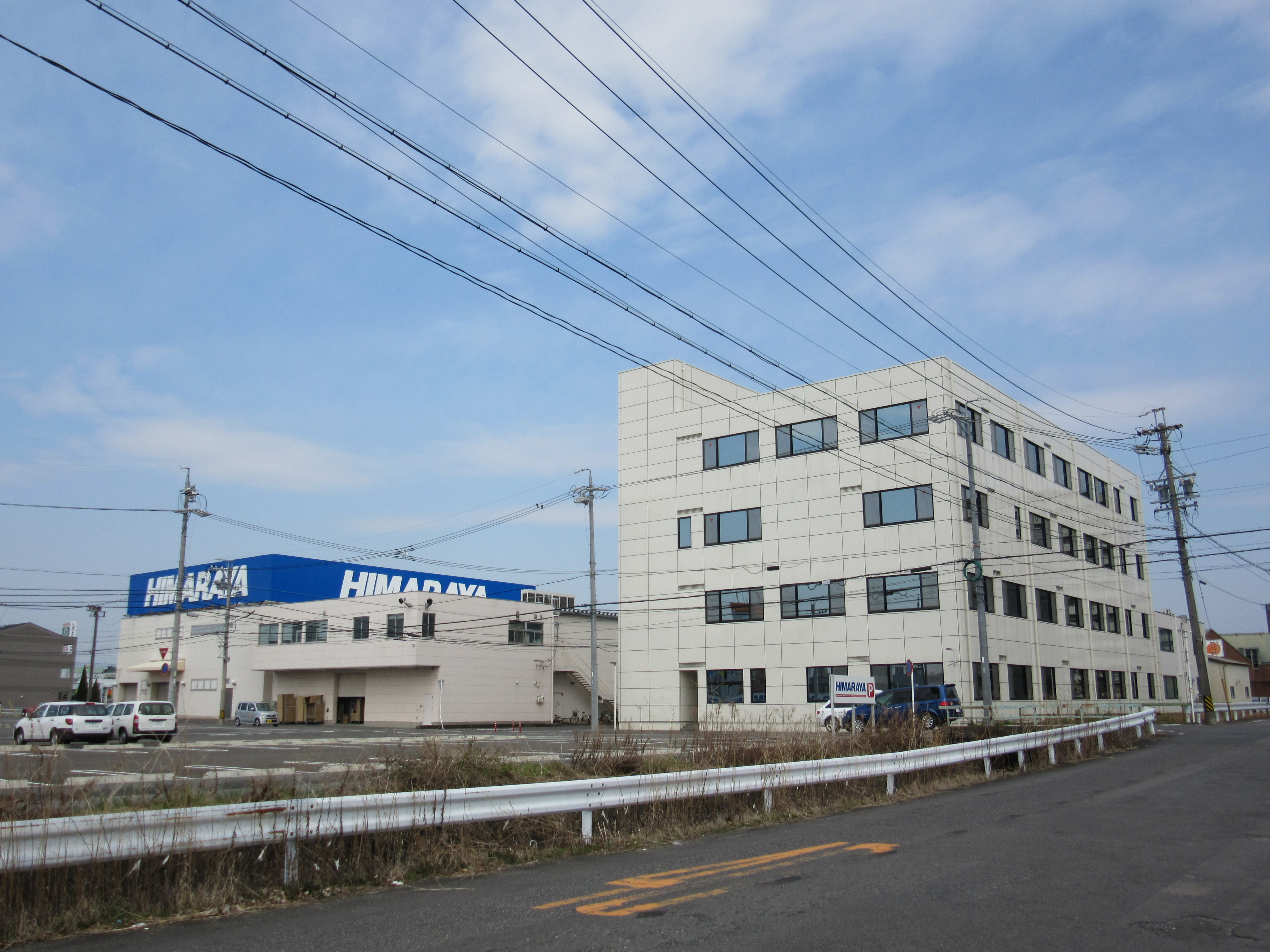 ヒマラヤ本社(右側）・本店（左側）